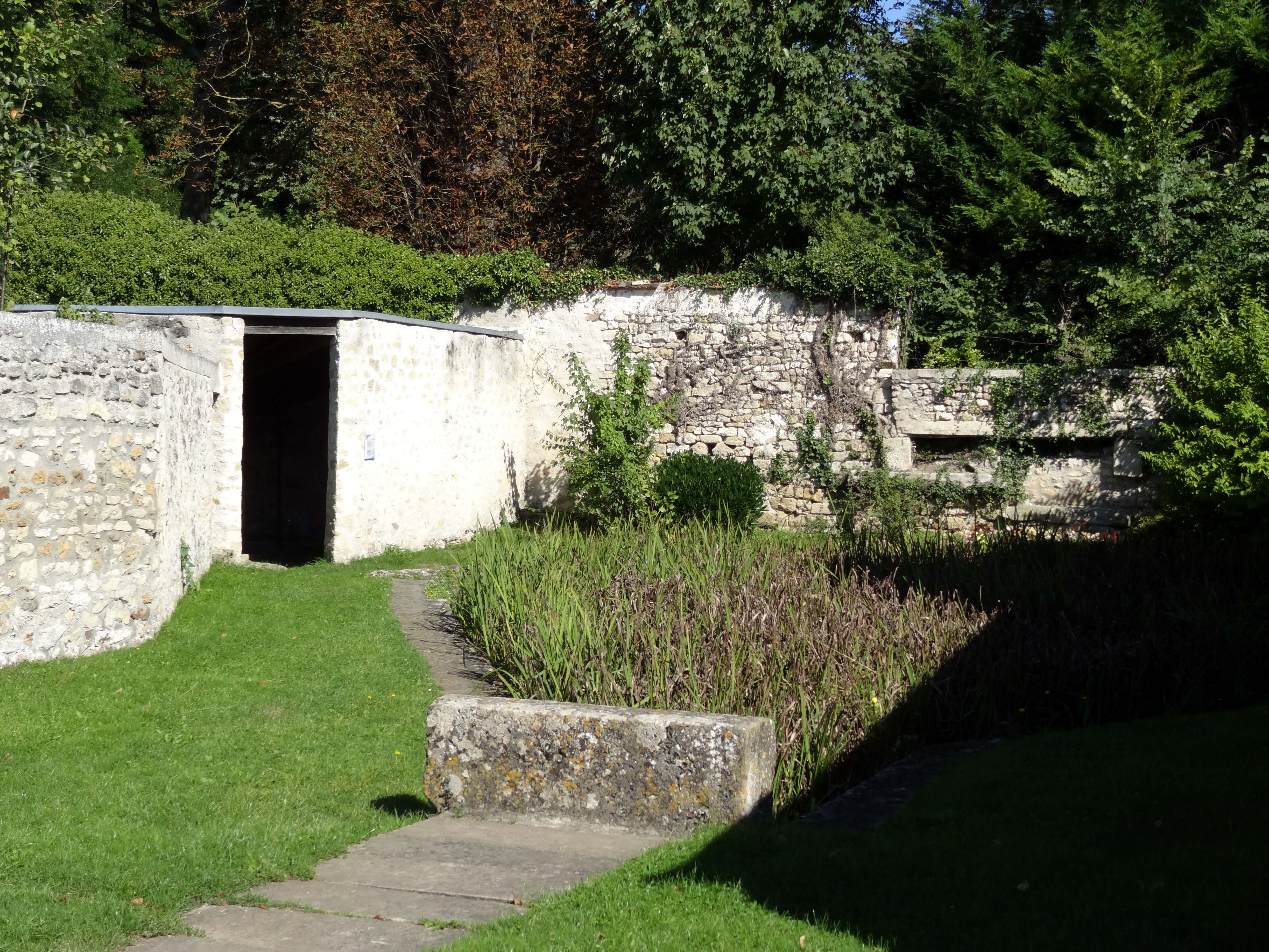 Hameau de Rueil - voir titre.